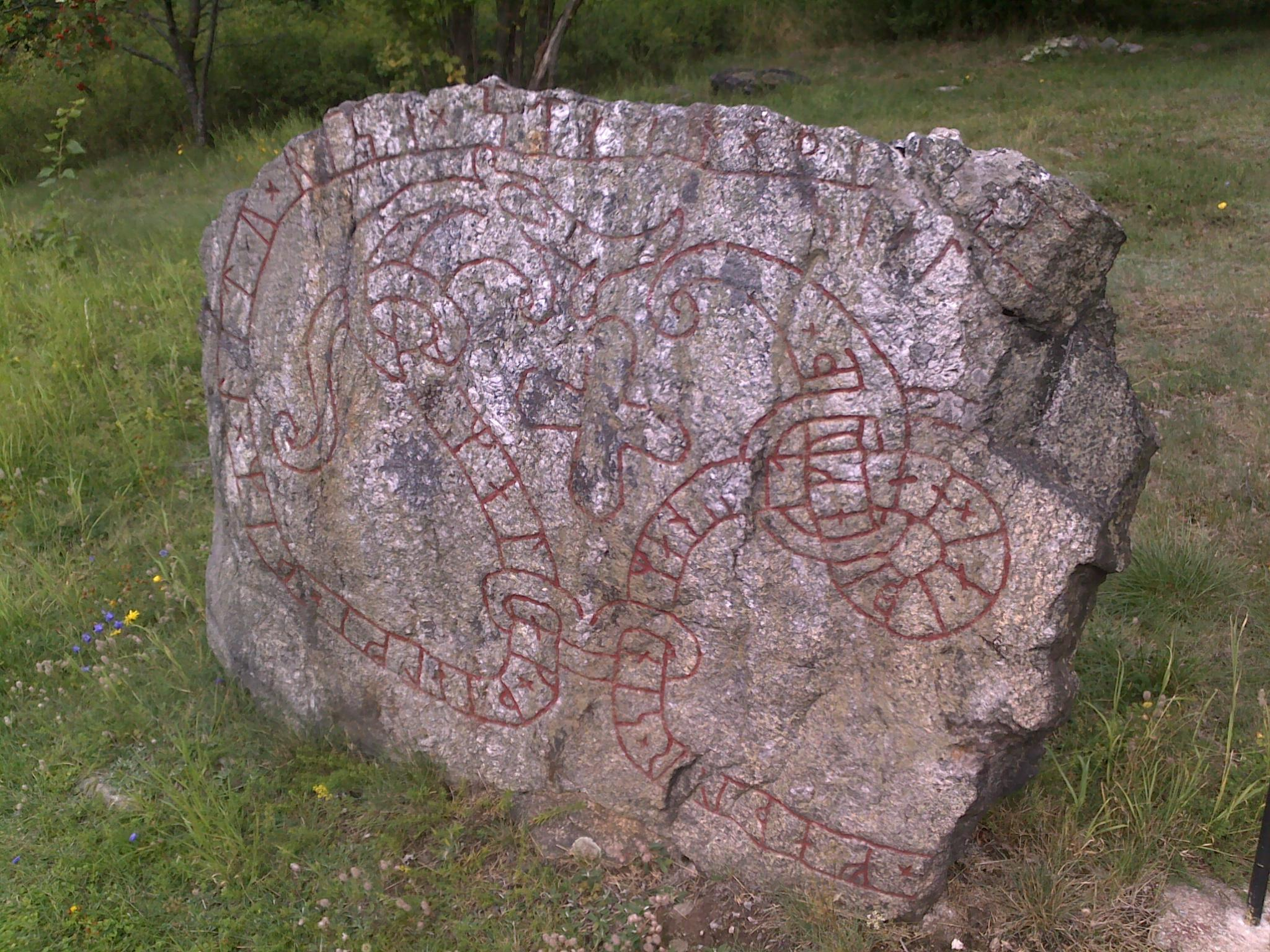 Runstenen U 56 i Bromma. Runstenens inskription lyder enligt skylten från Stockholms Stadsmuseum bredvid stenen: Gammal och Tjälve de läto resa denna sten (efter...) efter sin fader, en dugande man. Gud hjälpe hans själ.